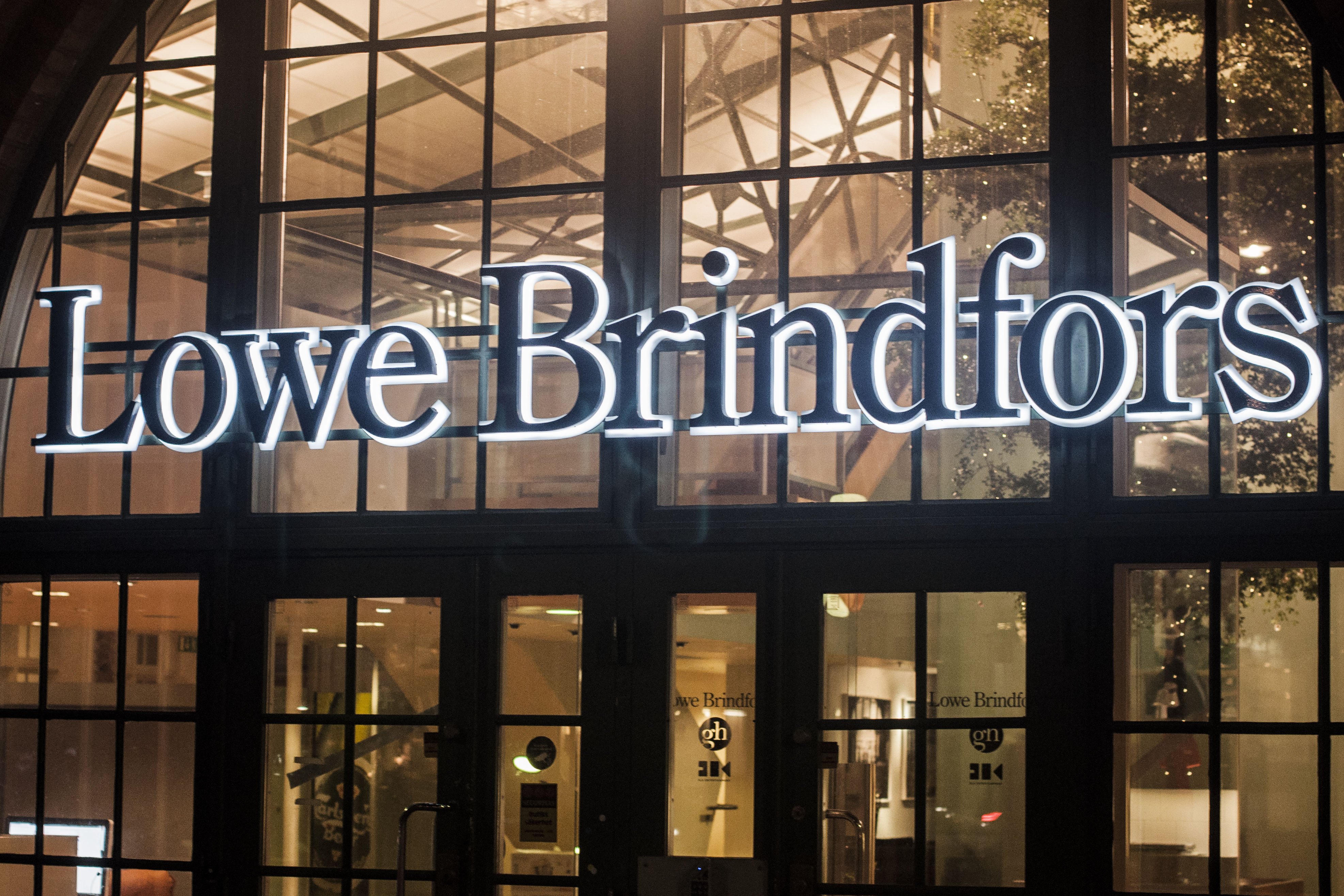 Lowe Brindfors på Birger Jarlsgatan 57C